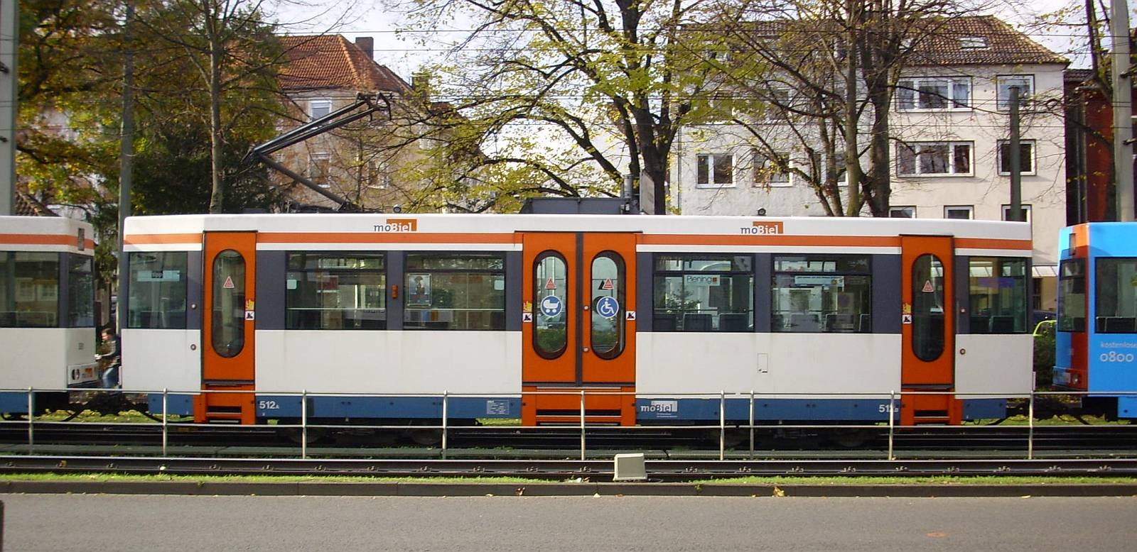 Doczepa bierna MB4 (prod. Siemens / AD Tranz).